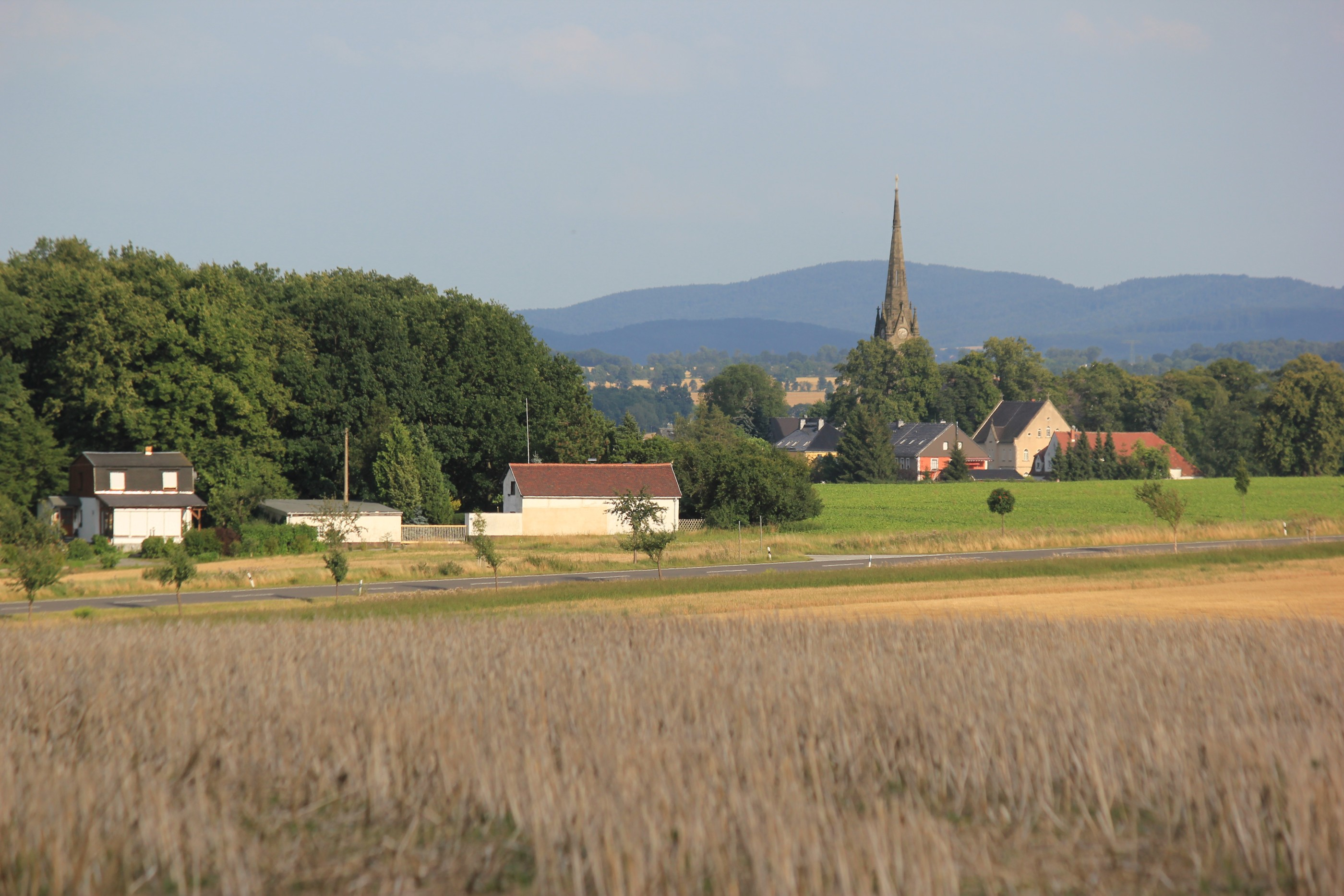 Hornjoserbsce: Napohlad Baćonja z Čornobohom w pozadku.